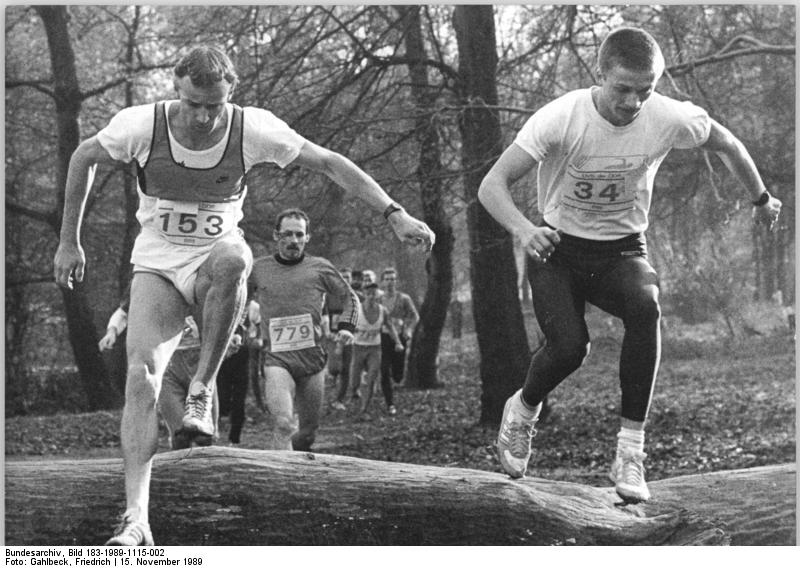 Olaf Beyer, Dirk Nürnberger ADN-ZB Gahlbeck 15.11.89 Leipzig: Cross-Serie- Im Hauptwettbewerb der Männer über 4 km siegte Olaf Beyer (Lok Potsdam, Nr. 153) vor dem Leipzijer DHfK-Studenten Dirk Nürnberger (r.). Beyer holte sich auch den Gesamtsieg mit der Idealpunktzahl 0, da er die beiden vorherigen Wettbewerbe ebenfalls klar gewonnen hatte.